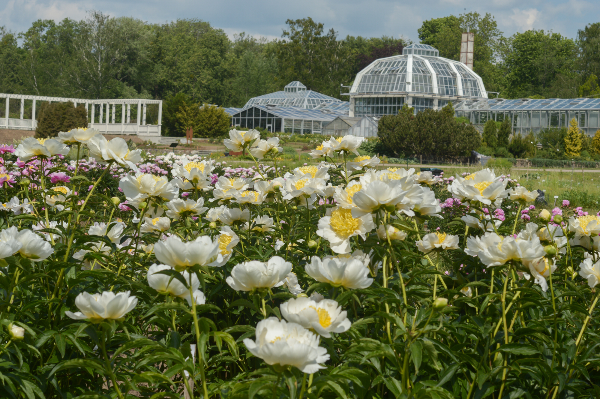 Bijūnų kolekcija VDU Botanikos sode Collection of peonies VMU Botanical garden in Kaunas